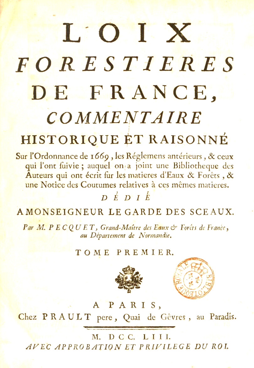 Loix forestieres de France. Tome 1 / , commentaire historique et raisonné sur l'ordonnance de 1669, les réglements antérieurs, & ceux qui l'ont suivie; auquel on a joint une Bibliotheque des auteurs qui ont écrit sur les matieres d'Eaux & forêts, & une notice des coutumes relatives à ces mêmes matieres... Par M. Pecquet... Tome premier.